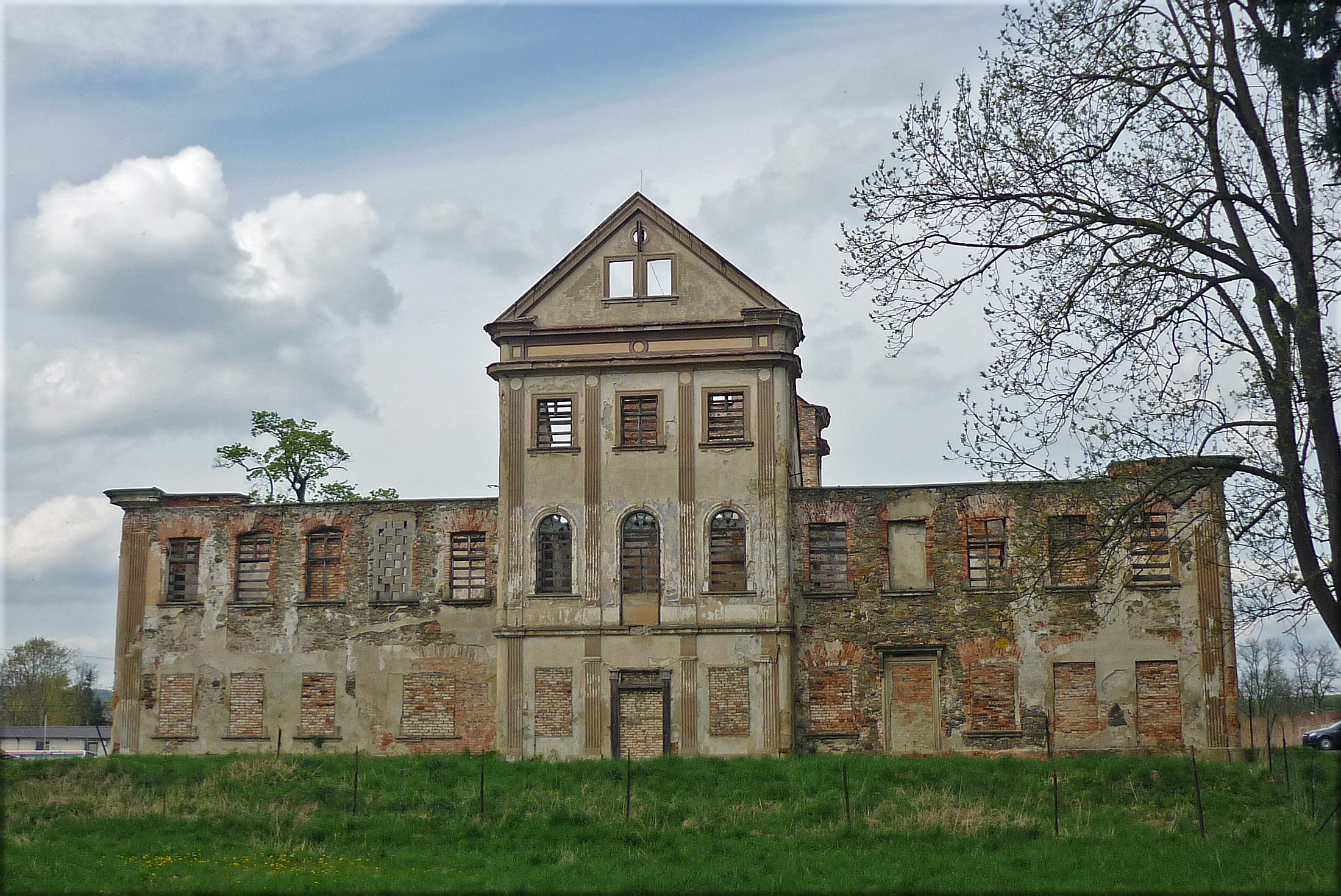 Schlossruine Beerberg (Baworowo) in Marklissa/OL (Leśna) in Niederschlesien